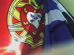 Eigen foto